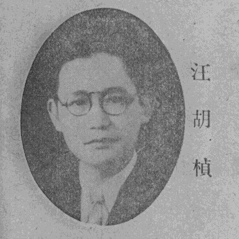 中文（台灣）: 《民國名人圖鑑》肖像